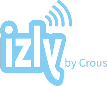 Logotype d'Izly by Crous